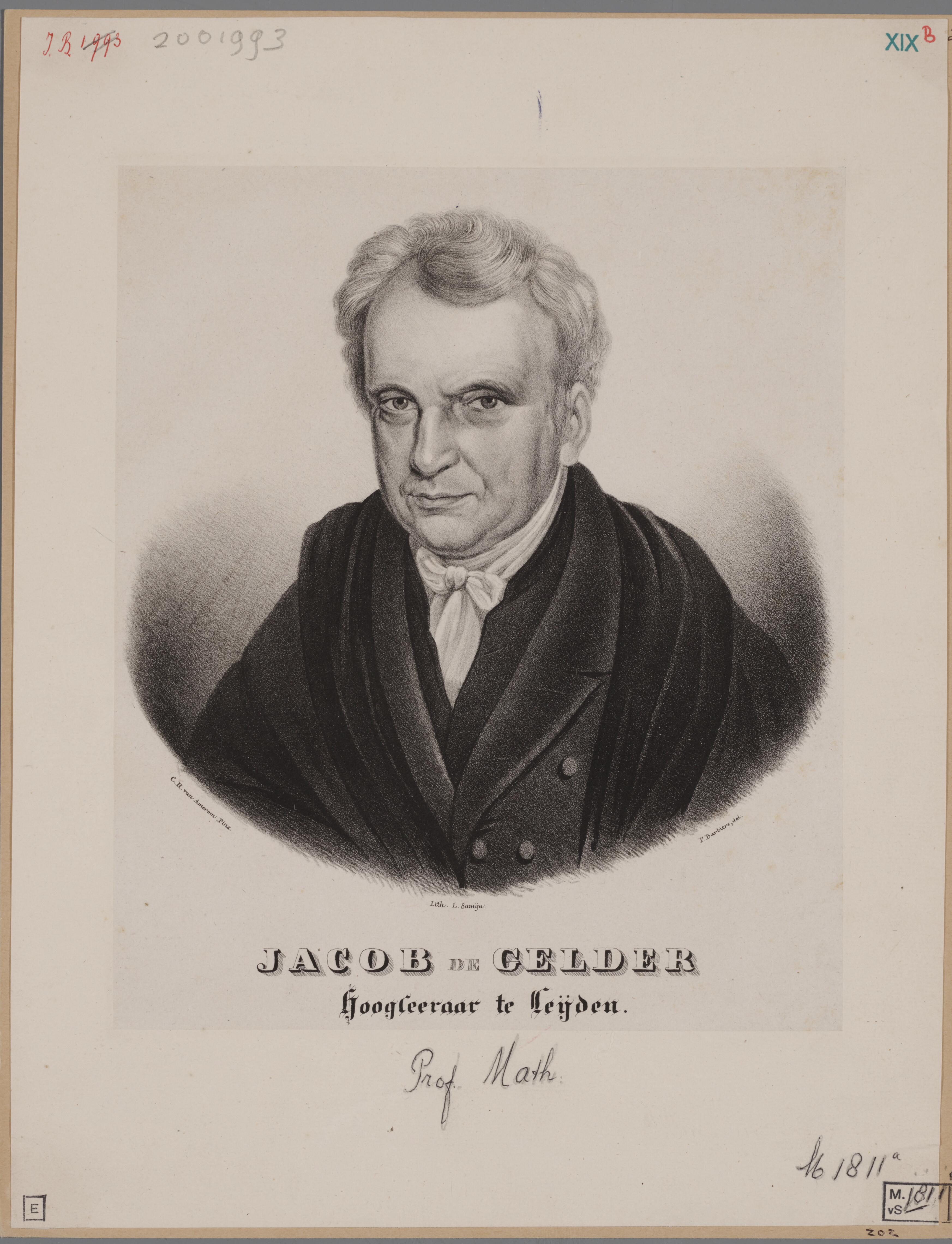 Portret en face van hoogleraar Jacob de Gelder. Zijn hoofd is een fractie naar links gedraaid. Hij draagt een donkere mantel en een geplooide sjaal over zijn schouders; om zijn hals is een witte sjaal gestrikt. Naar een schilderij van Cornelis Hendrik van Amerom (1804-1874).